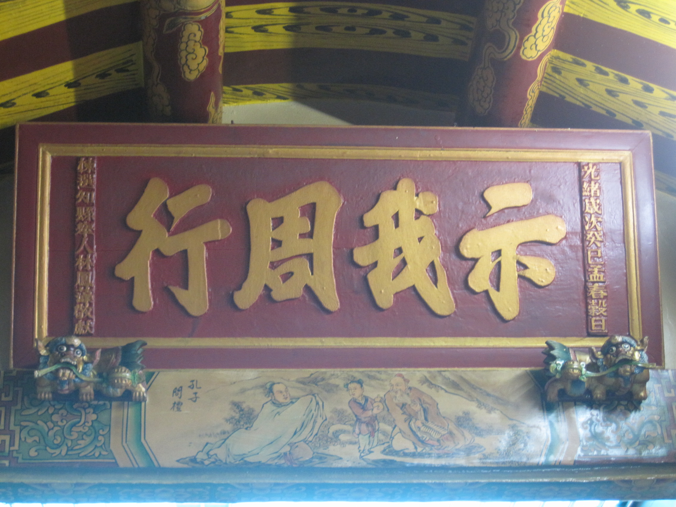 武當山上帝廟示我周行匾